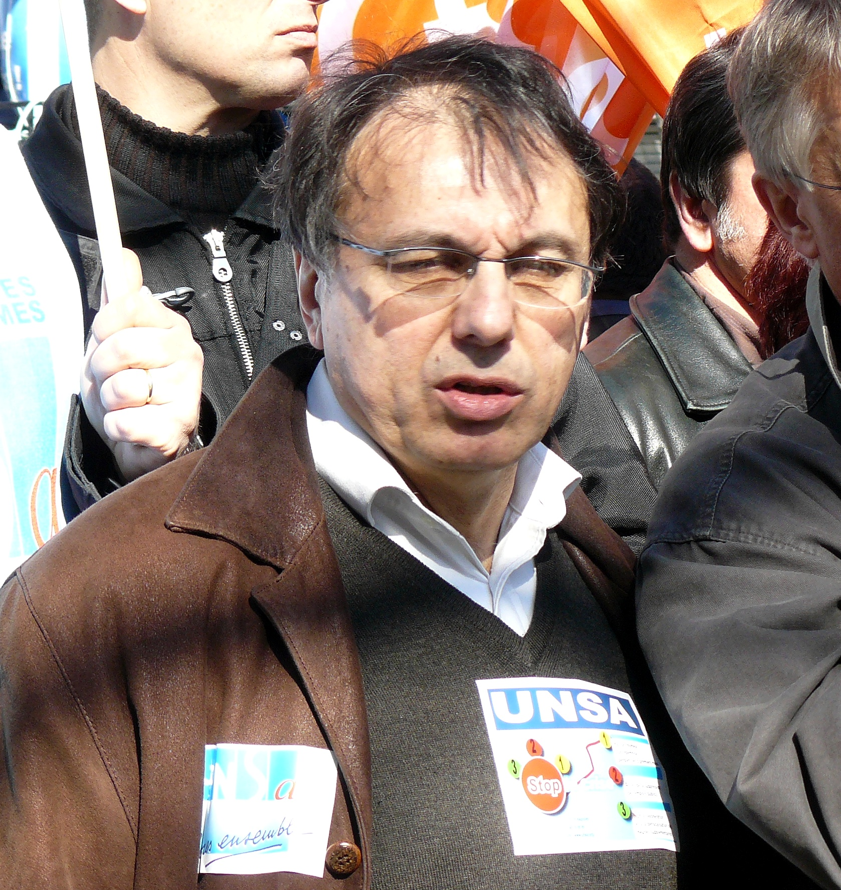 Le dirigeant du syndicat UNSA, Alain Olive, dans le cortège de la manifestation du 19 mars 2009 à Paris.